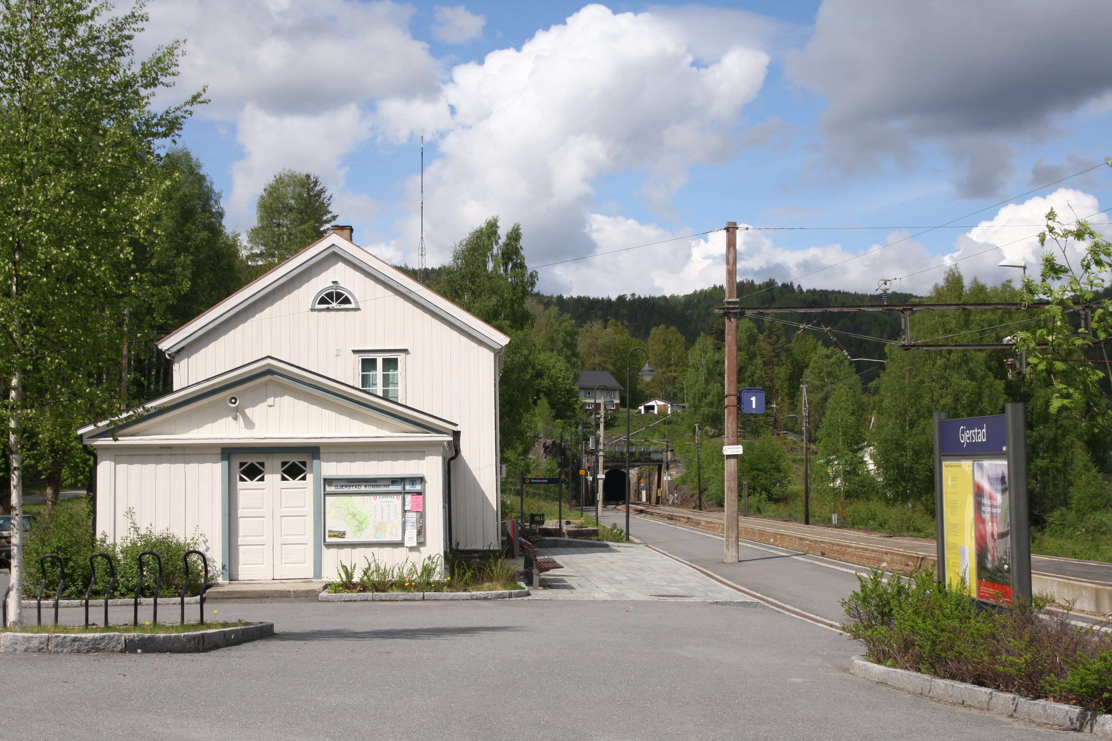 Gjerstad stasjon